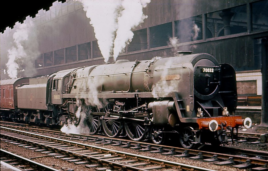 1965 I reckon.